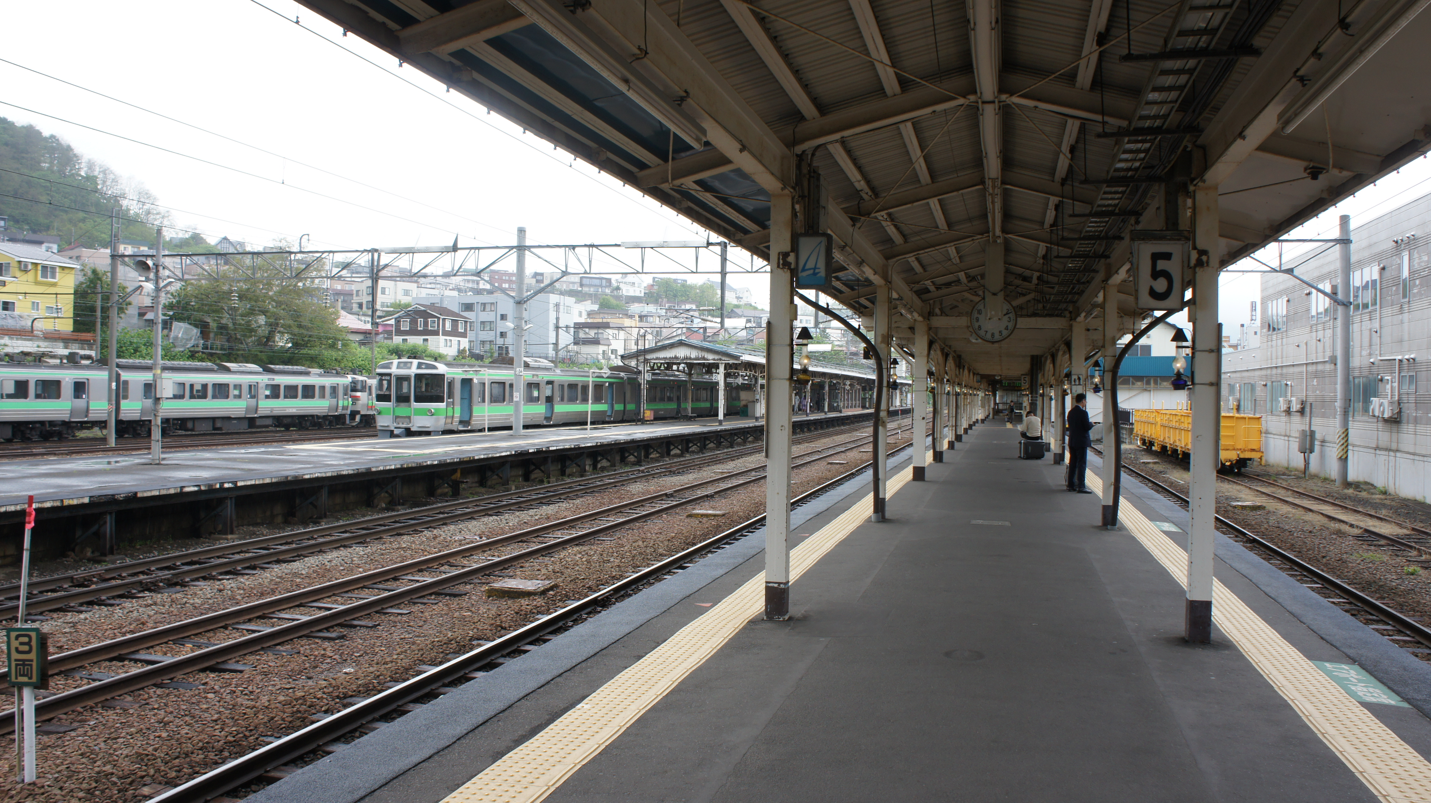 JR函館本線・小樽駅ホーム全体 Sony NEX-3